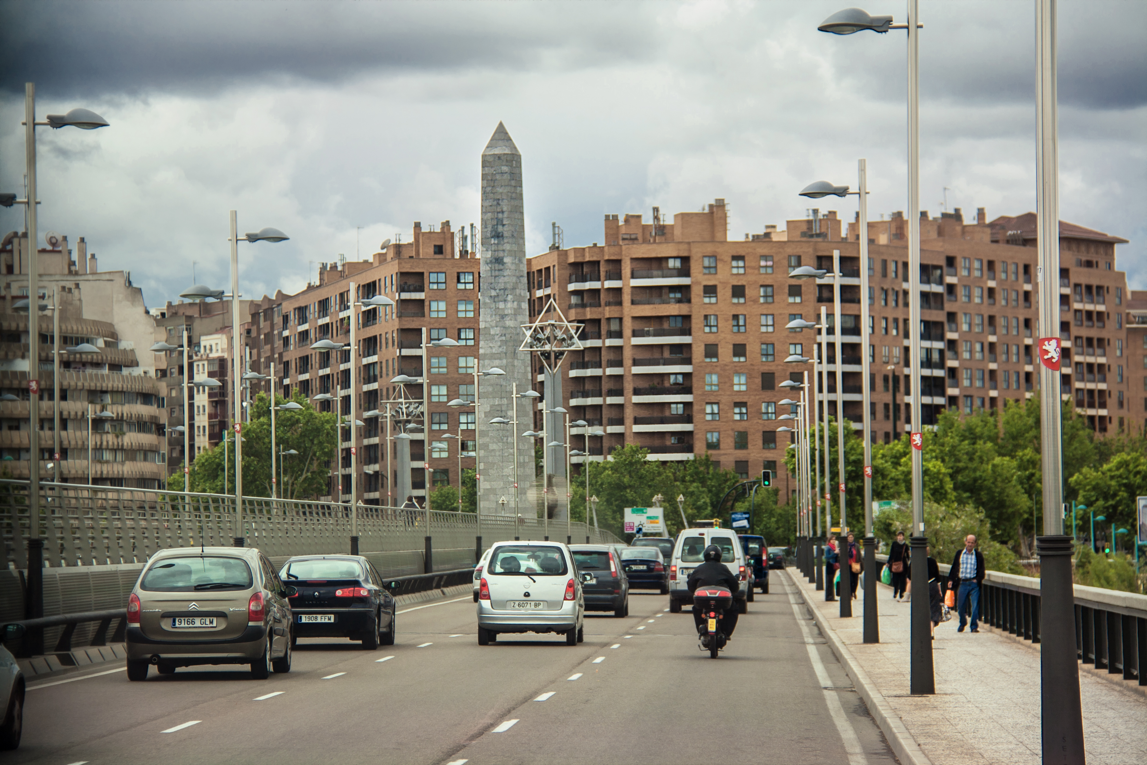 Zaragoza, España